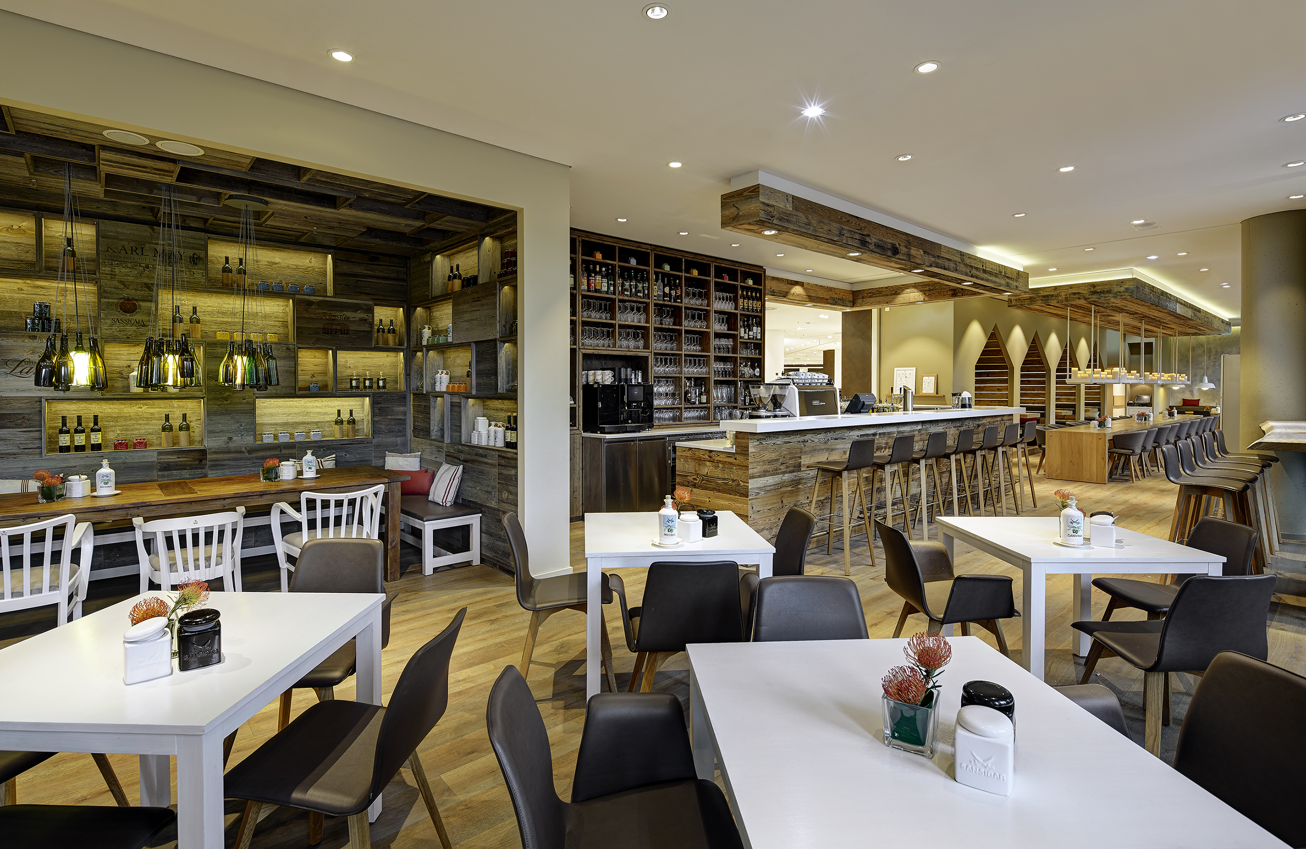 Ресторан "Занзибар", ТД "Бройнингер", г. Дюссельдорф